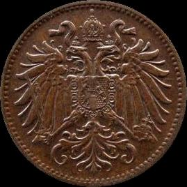 2 heller, 1893 (Austria) - obverse